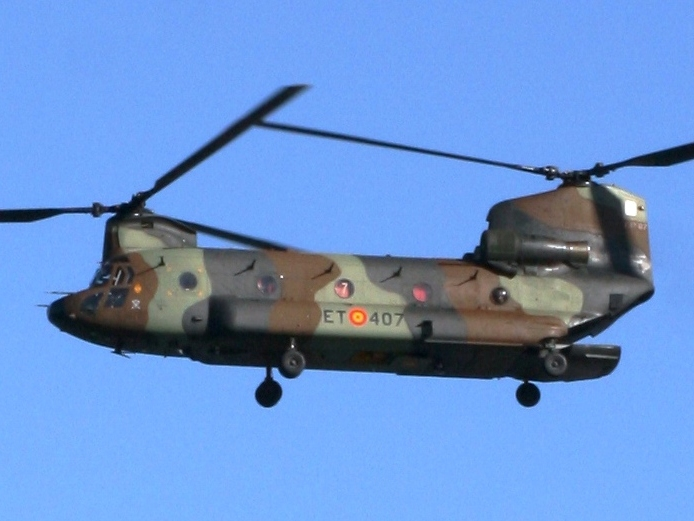 Un helicóptero CH-47D Chinook del Ejército de Tierra de España en una exhibición aeronaval en Santander, el 29 de mayo de 2009 (Imagen recortada).